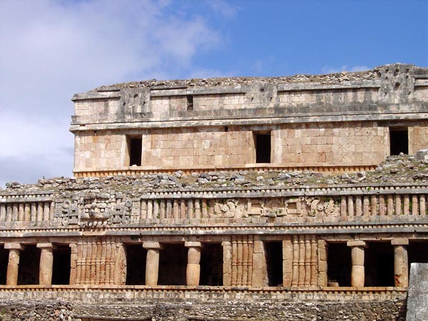 Sayil